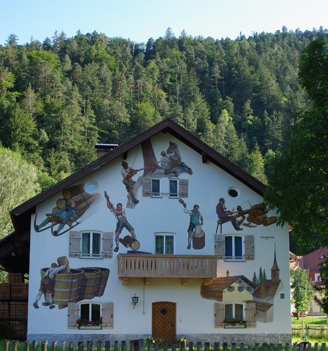 Haus Thumseestr. 21 in 83435 Bad Reichenhall; Fassadenmalerei von Lothar Korvin